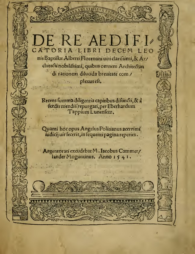 De re aedificatoria libri decem Leonis Baptistæ Alberti Florentini ... quibus omnem architectandi rationem dilucida breuitate complexus est. Recens summa diligentia capitibus distincti, & a foedis mendis repurgati, per Eberhardum Tappium Lunensem. Quanti. - Argentorati : excudebat M. Iacobus Cammerlander Moguntinus, 1541. - [6], 165 [i.e.166] c. ; 4°. - Marca n.c. (simile a S816) in fine. - Front. entro cornice xil. architettonica manieristica. - Iniziali xil. su fondo nero. . Frontespizio